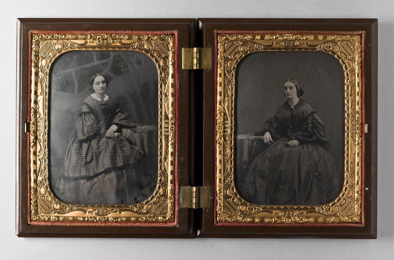 Depicted person: Fredrique Freese, FRÖKEN; Ida Freese, FRÖKEN